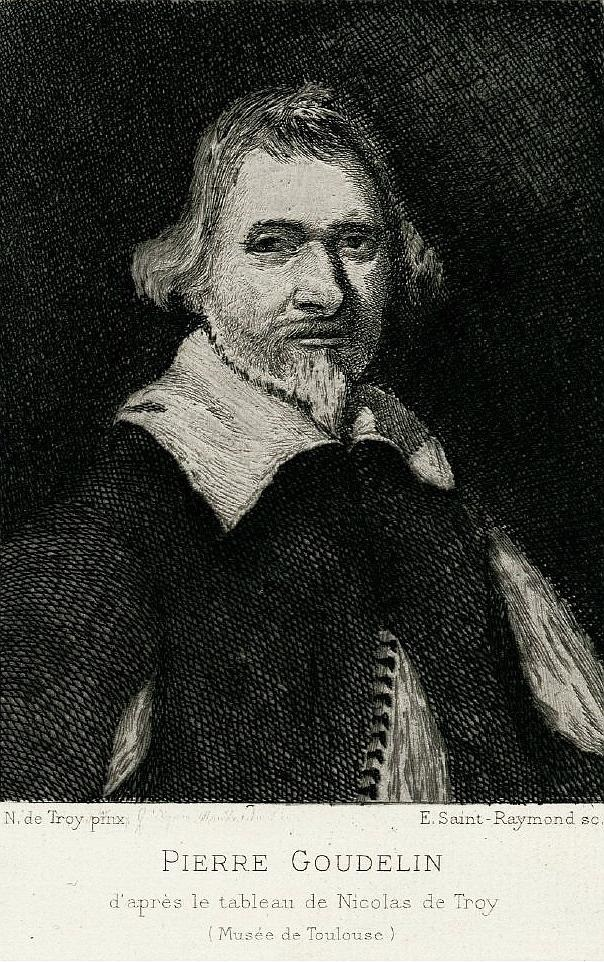 Pierre Goudelin, d'après le tableau de Nicolas de Troy (Musée de Toulouse - E. Saint-Raymond sc.)